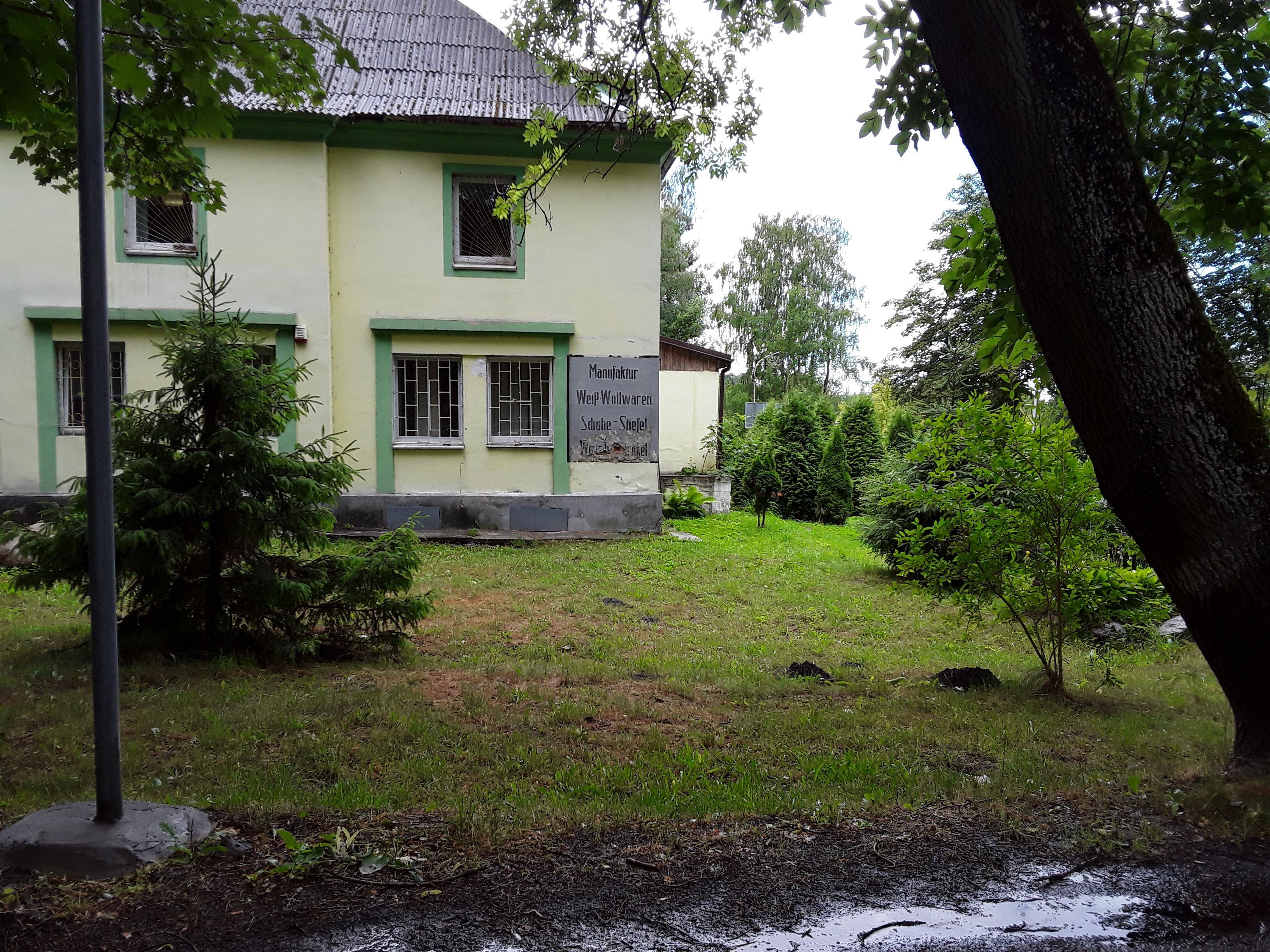 Ludwigsort, ehem. Kolonialwarengeschäft: die deutschen Inschriften sind noch vorhanden